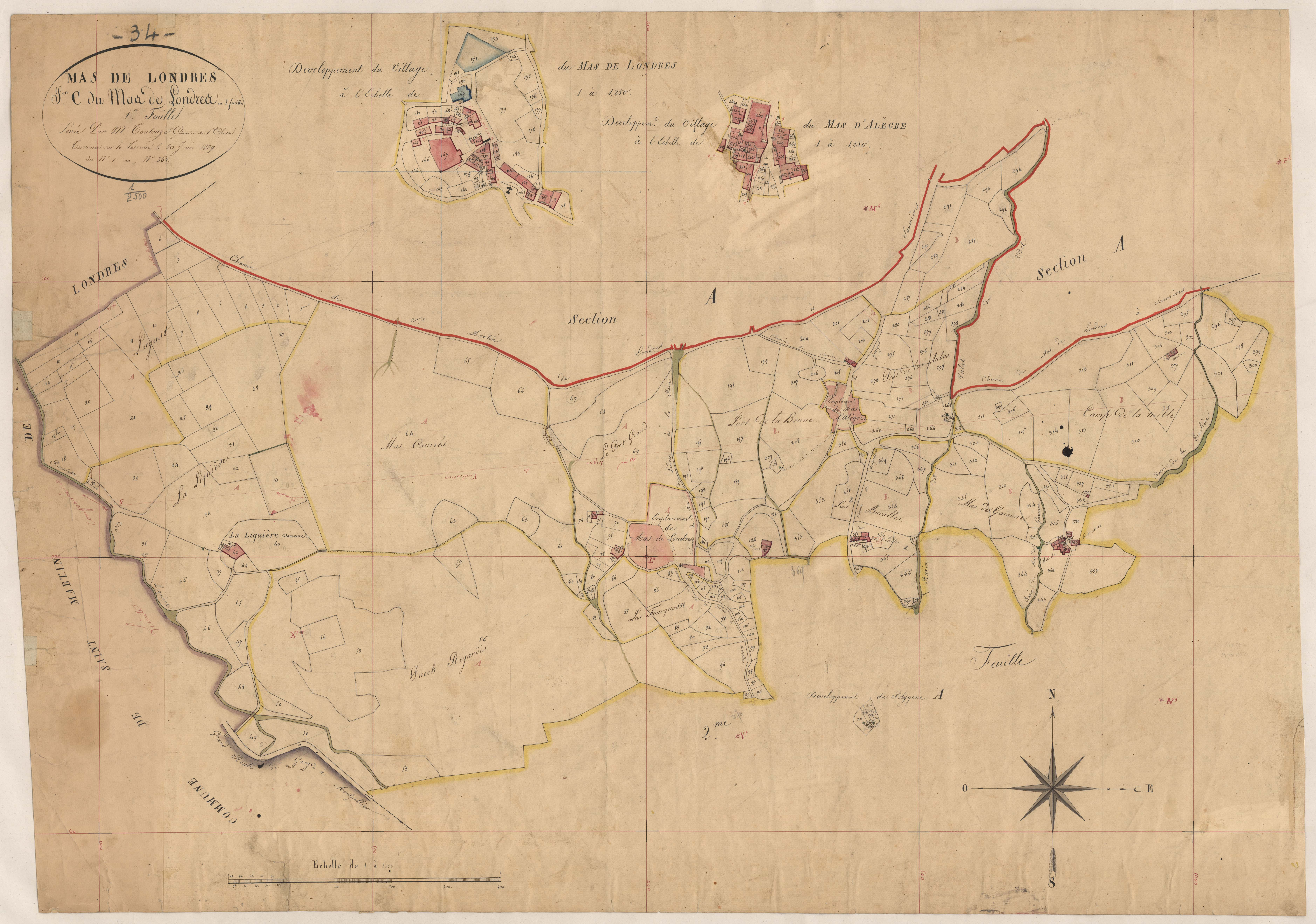 Mas-de-Londres. - Cadastre napoléonien : plan de la section C1 du Mas-de-Londres